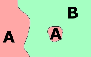 Schéma enklávy a súčsne exklávy Zdroj: nakreslené - Vladimír Tóth Dátum: 17.12.2006 Autor: Ike - Vladimír Tóth Povolenie: PD Iné verzie tohto súboru: Nie